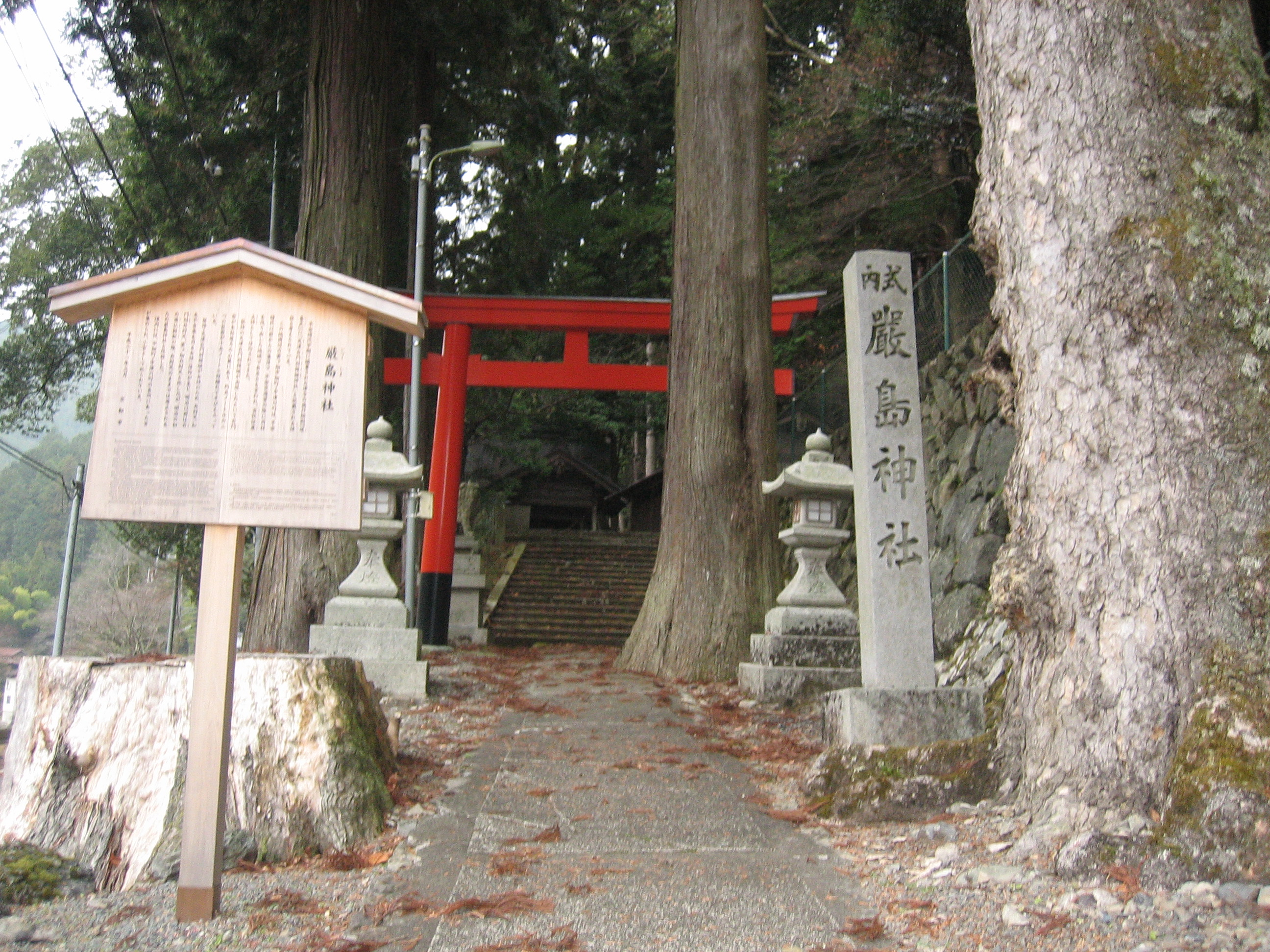 雲ケ畑中畑町、厳島神社門前を撮影